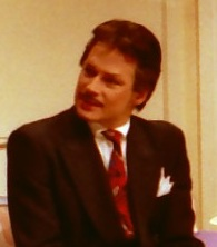 Stig Engström i "Omaka par" 1988 på Maximteatern i Stockholm.